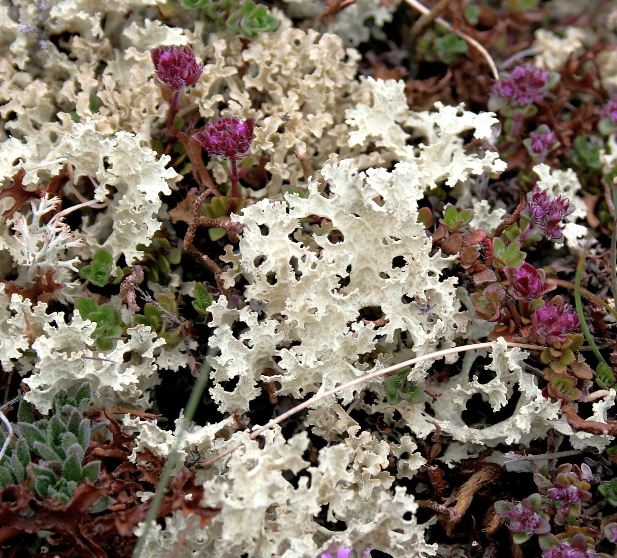 Isländisches_Moos_(Cetraria_islandica) rechts und Schneeflechte (links) am_Mývatn